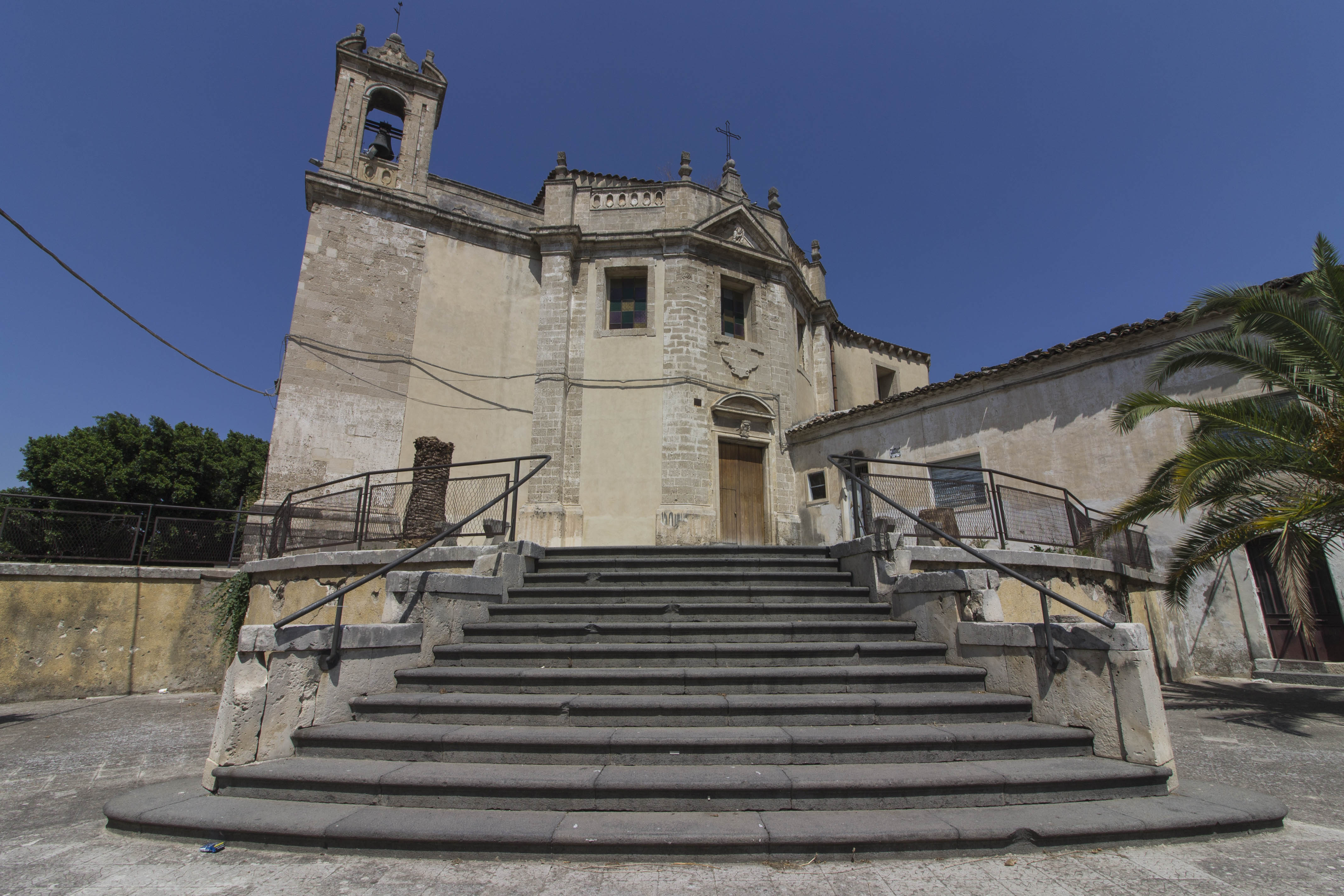 Edificata nel XVIII° secolo,( lavori terminati nel 1762, come inciso sotto la croce). Di bellissima architettura settecentesca, conserva un antico e raro organo a mantice alla sommità di una scala monumentale ed opere raccolte da chiese distrutte dal terremoto del 1693. Di interessante bellezza un quadro raffigurante san Michele all'ingresso, una bellissima fonte battesimale scolpita in pietra e il quadro sull'altare maggiore raffigurante san francesco di Paola. Una particolarità di questa chiesa è che ha una pianta a croce greca: è l'unica nel paese ed una delle poche nel territorio.